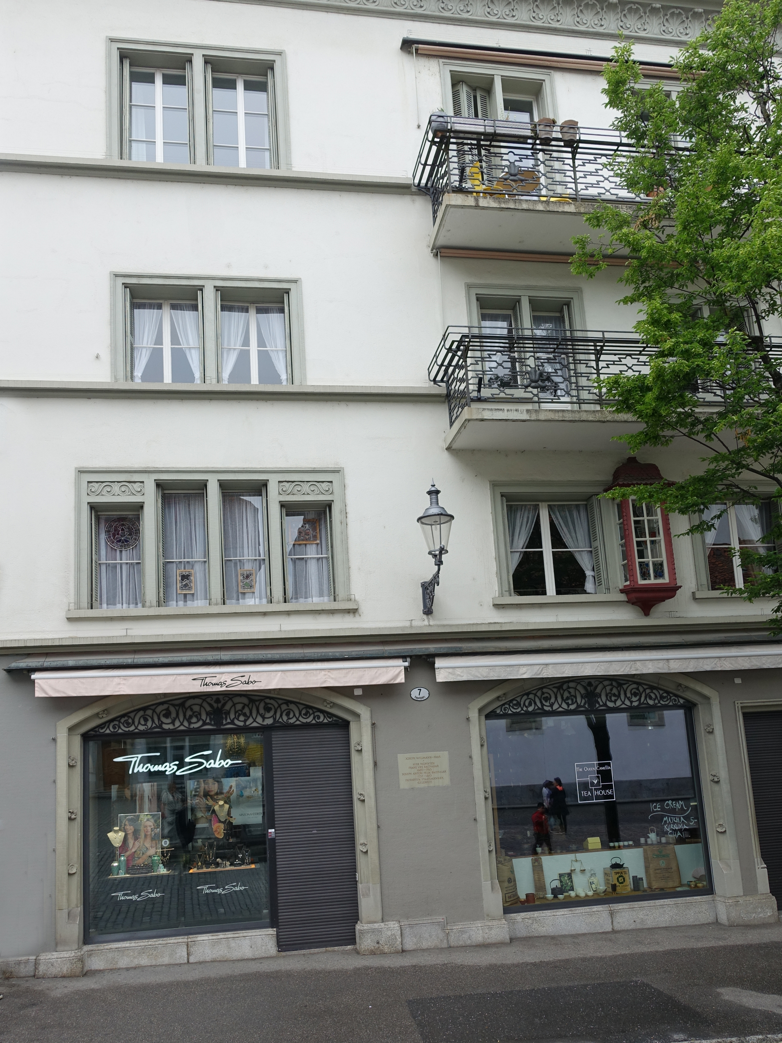 Joseph Willmann Haus. Hier wohnten Franz Urs Bathasar (1689–1763) und Joseph Anton Felix Balthasar (1737–1810). Kapellplatz 7, Luzern, Schweiz